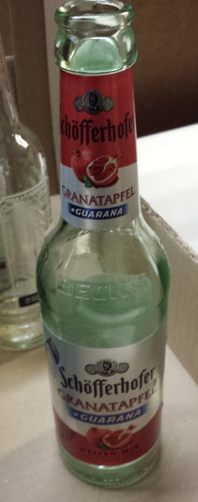 Eine falsch Rückgeführte Embossingflsche der Firma Becks, die bei Schöfferhofer nicht erkannt und zur Abfüllung des eigenen Biermischgetränk genutzt wurde